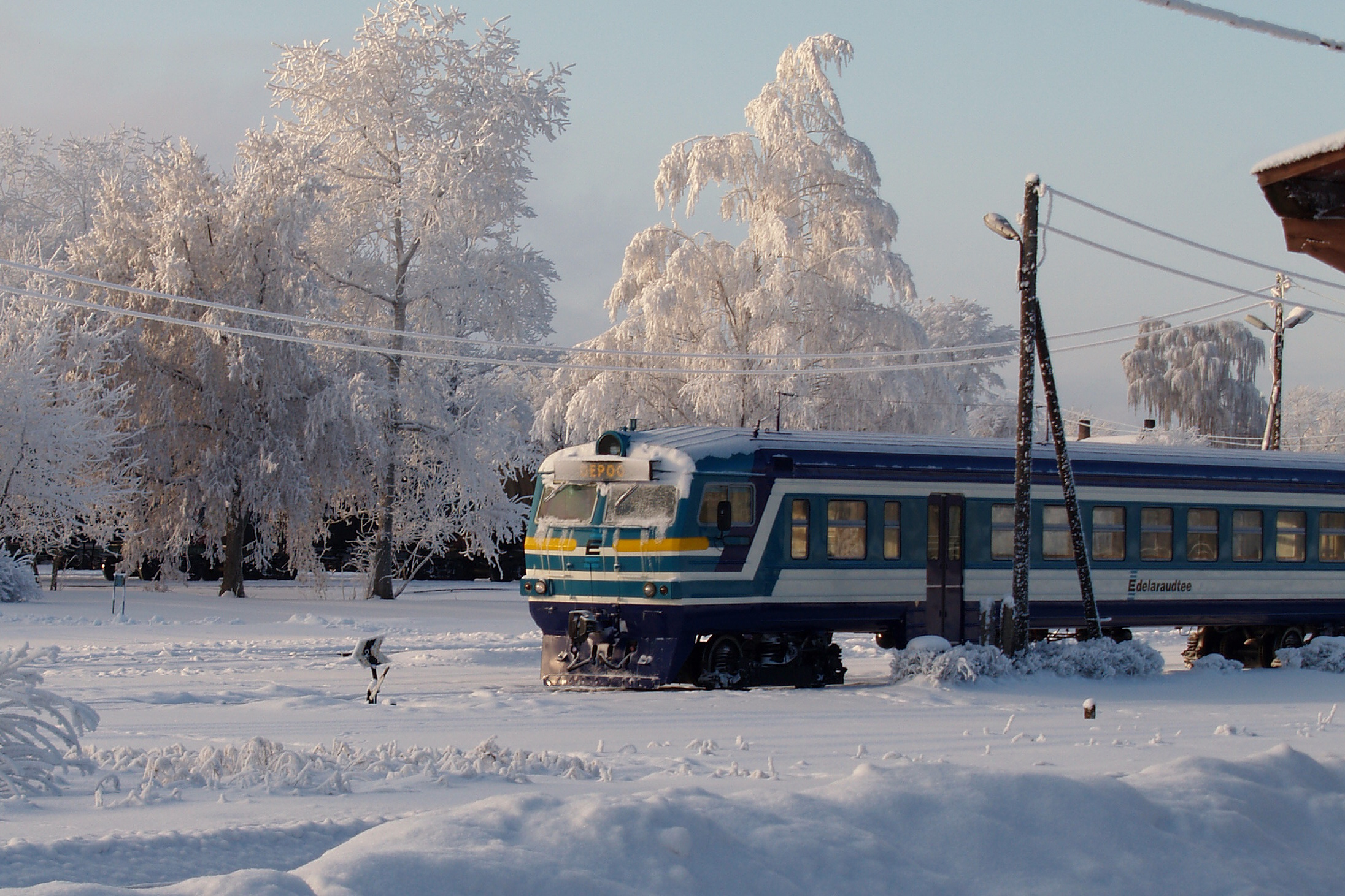 Edelaraudtee rong Tartu raudteejaamas.